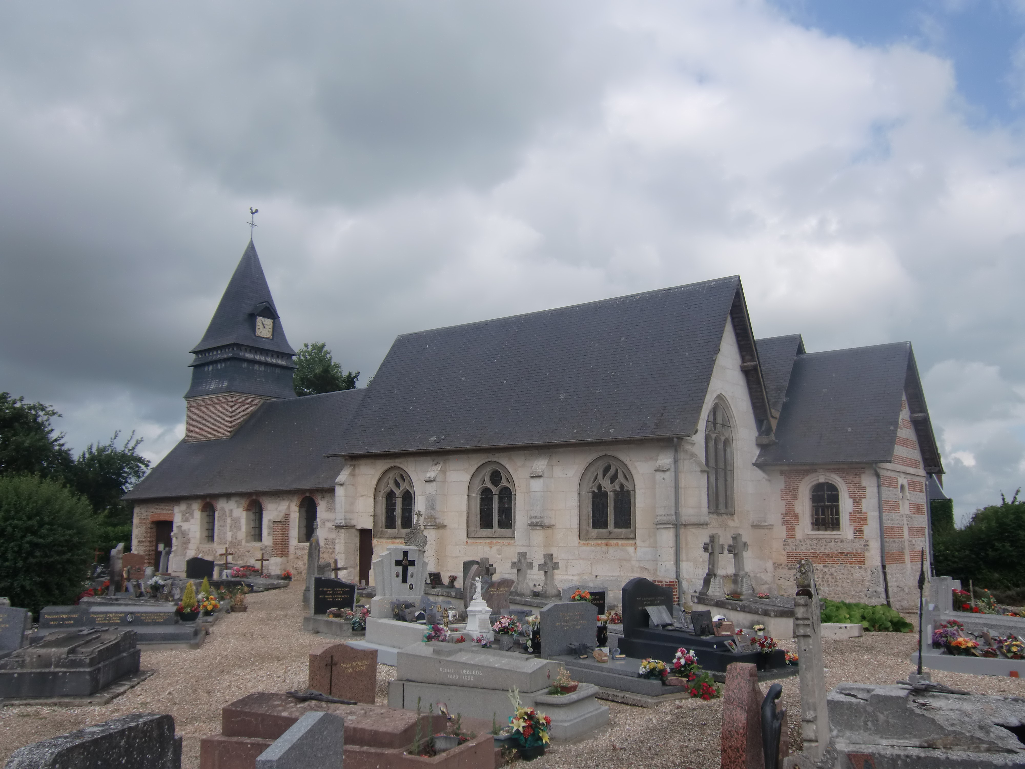 Eglise de Sainte-Croix sur Aizier (Eure, Normandie, France)